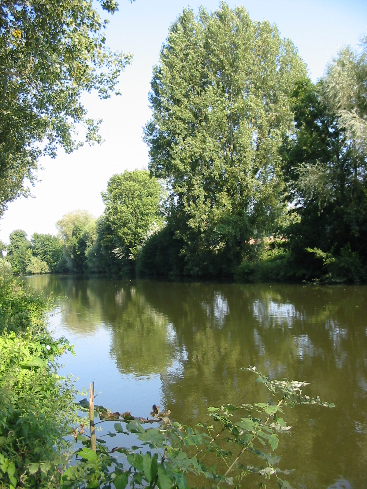 Somme River